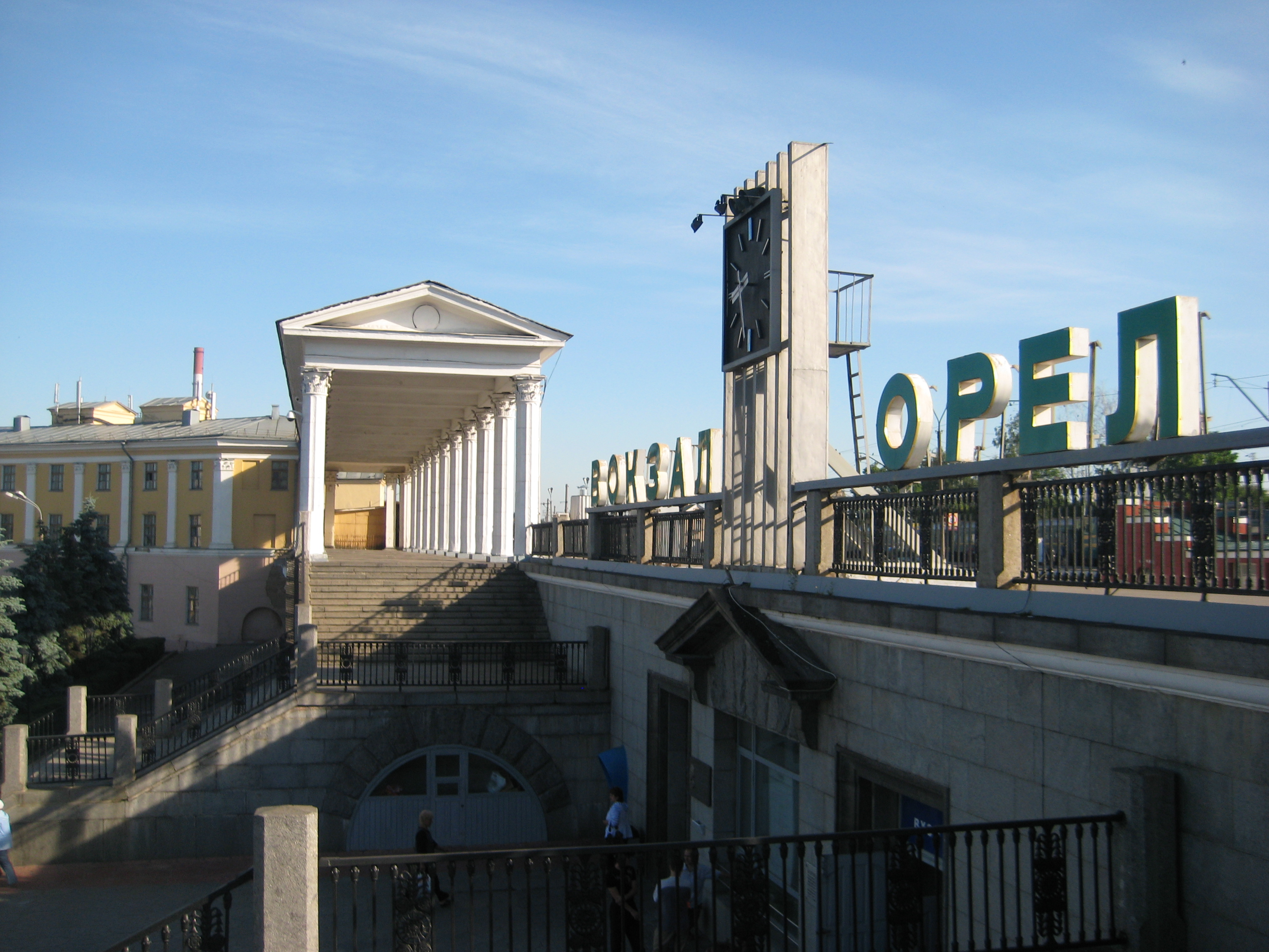 Архитектура пассажирского терминала вокзала г.Орла